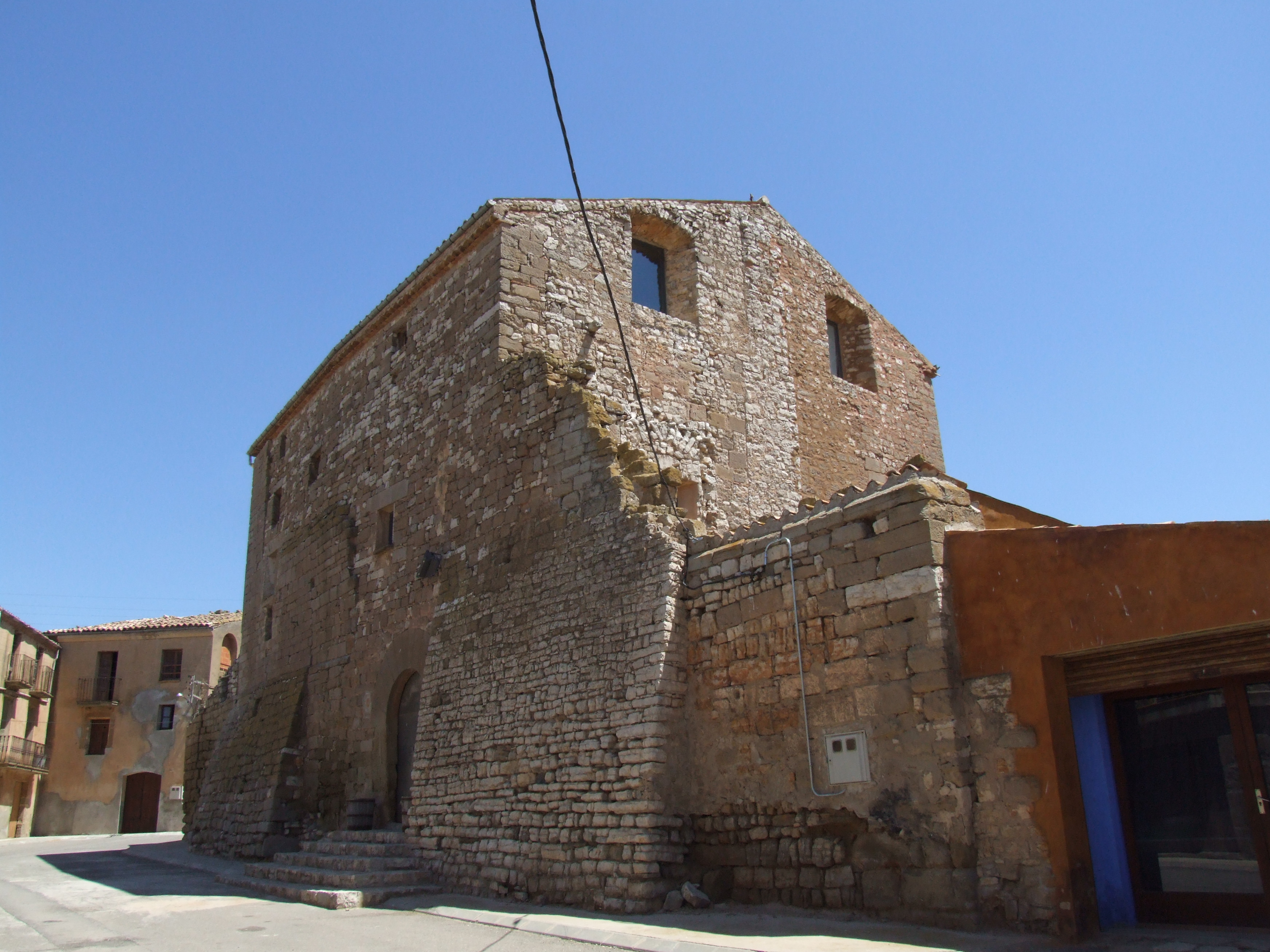 Castell de la Cardosa Object location41° 42′ 00.31″ N, 1° 15′ 10.29″ E